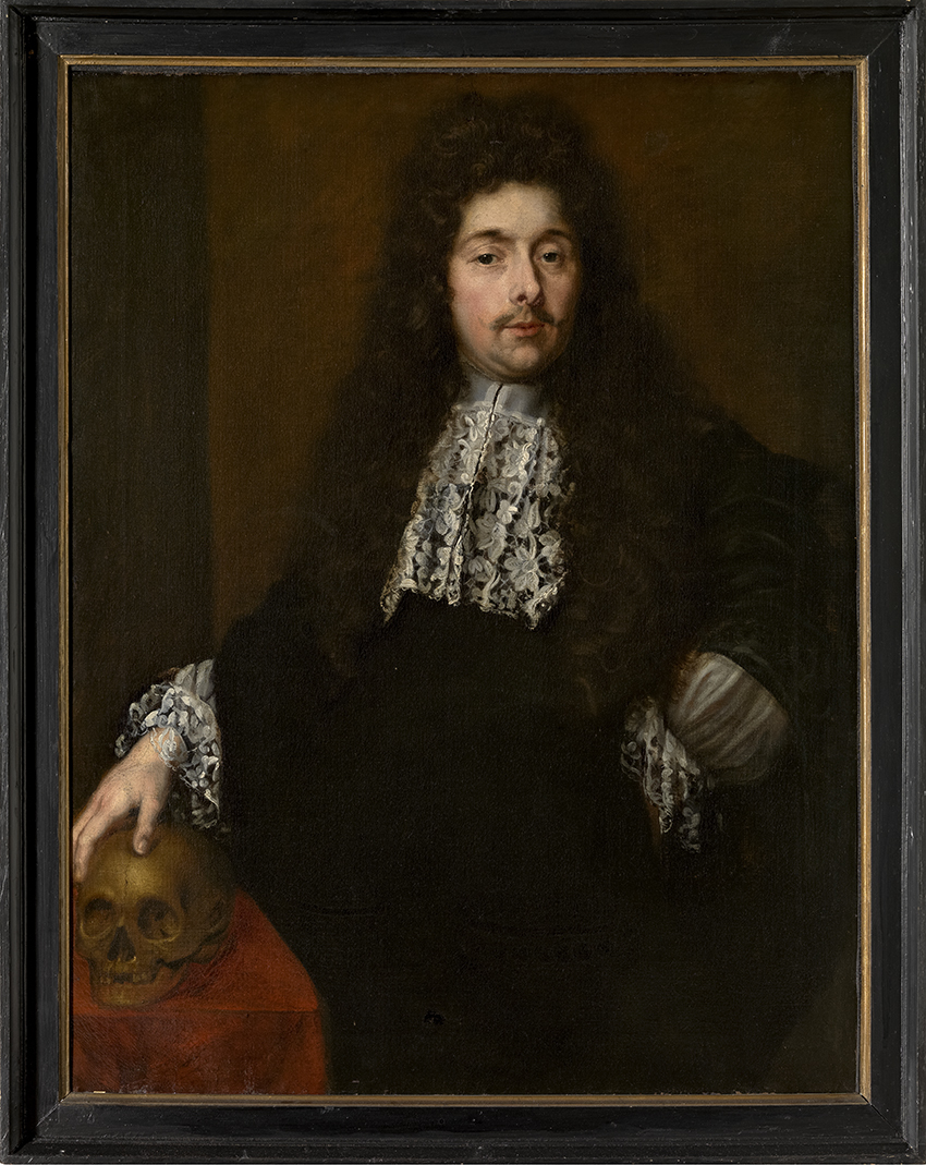 Portret van Hendrik Franssens, deken van het Brugse chirurgijnsambacht (Jacob II van Oost, circa 1675 - circa 1713); collection: Musea Brugge - Groeningemuseum